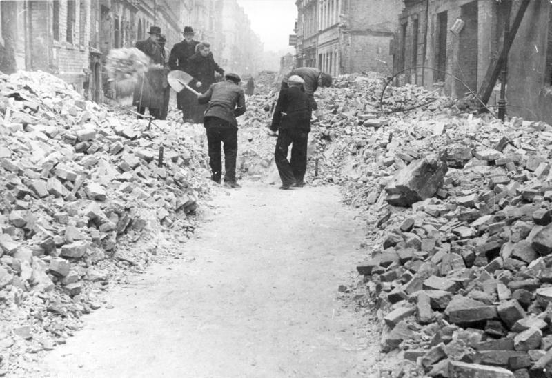 Berlin, Stallschreiberstraße, Zerstörungen Scherli: ADN-Zentralbild/Archiv II. Weltkrieg 1939-45 Berlin nach dem Terrorangriff am 3. Februar 1945, die Stallschreiberstraße. [Berlin, Stallschreiberstraße.- Männer bei Aufräumungsarbeiten zwischen Trümmerbergen]